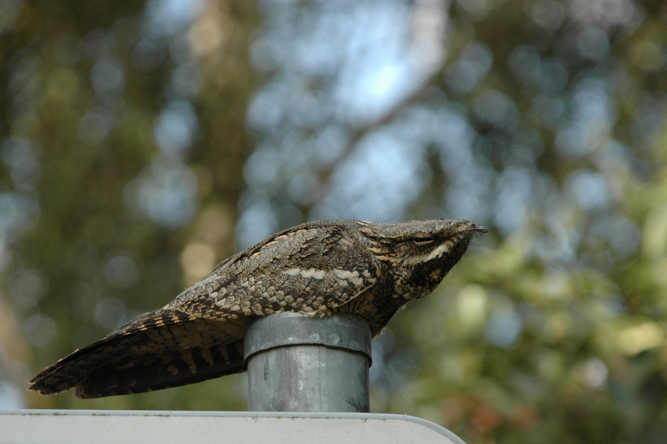 Lelek dzień spędza przyczajony w ukryciu, gdyż jest ptakiem nocnym